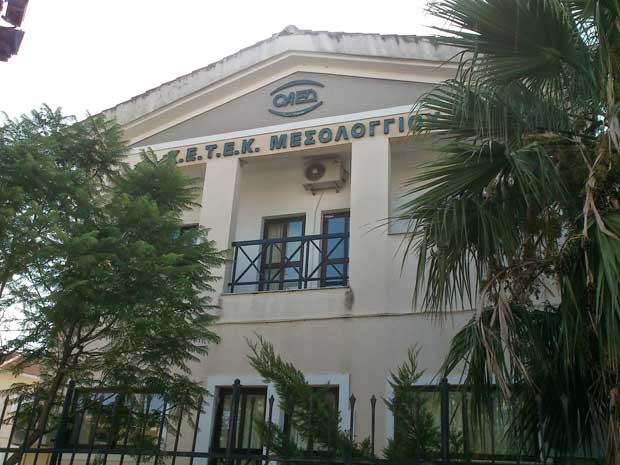 Η ΕΠΑ.Σ. ΟΑΕΔ Μεσολογγίου